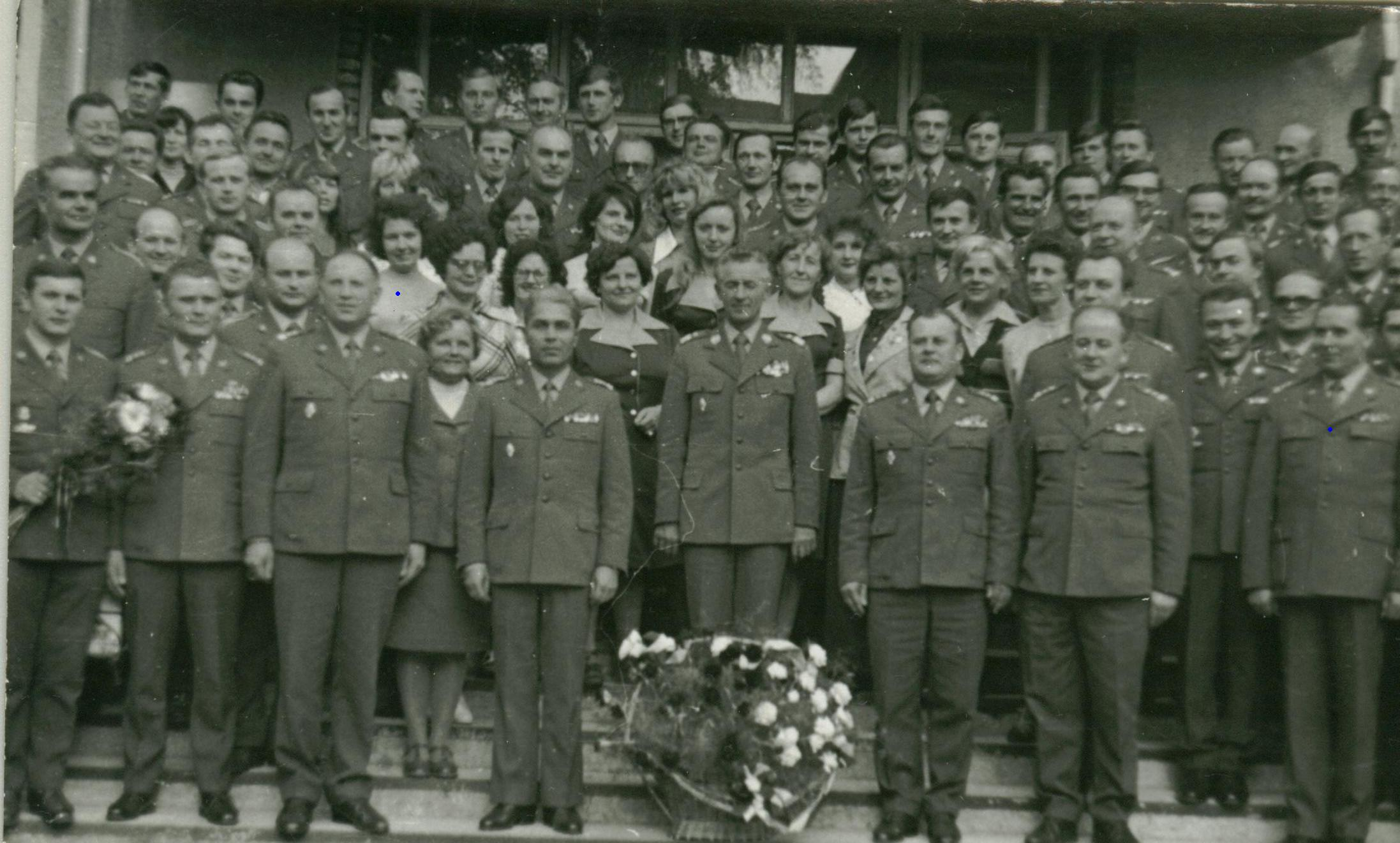 sztab 5 Saskiej Dywizji Pancernej właściciel zdjęcia P.Sz. autor skanu kerim44